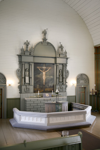 Nastolan kirkon alttari vuonna 2001 valmistuneen peruskorjauksen jälkeen.